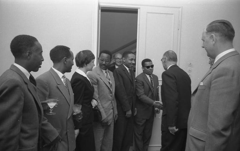 Essen für äthiopischen Aussenminister in der Redoute und den äthiopischen Minister für öffentliche Arbeiten (gestreifte Krawatte) (von links nach rechts) a) S.E. Herr Yilma Deressa, Außenminister b) S.E. Herr Mengesha Seyoum, Minister für öffentliche Arbeiten c) eine Dame (Dremmersheim) d) Herr Yohannis Kidane Mariam, Ministerialdirektor e) Herr Kebede Tsighe, Kulturattaché Botschaft Bonn f) Herr Kebede Gebre Wold, Geschäftsträger a. i. in Bonn